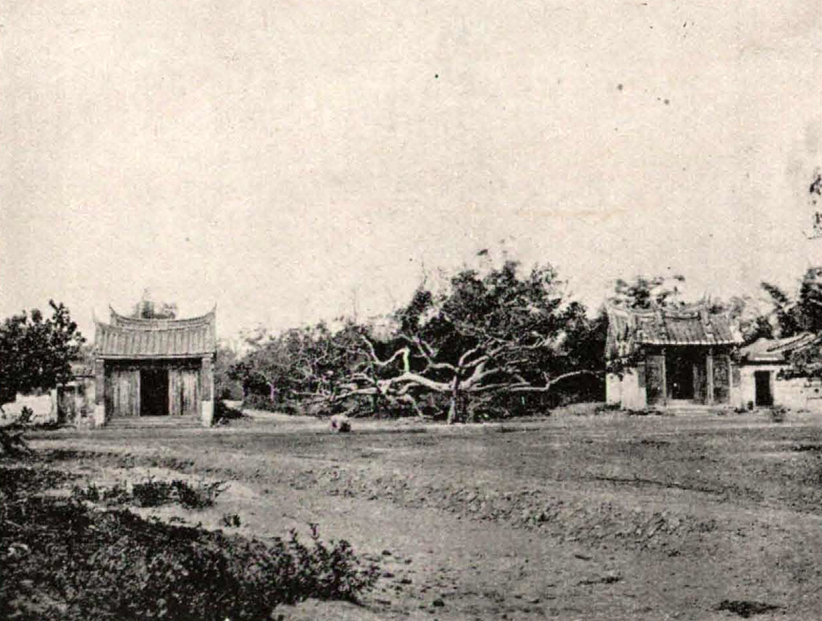 中文（台灣）: 日治時期之寧靖王廟